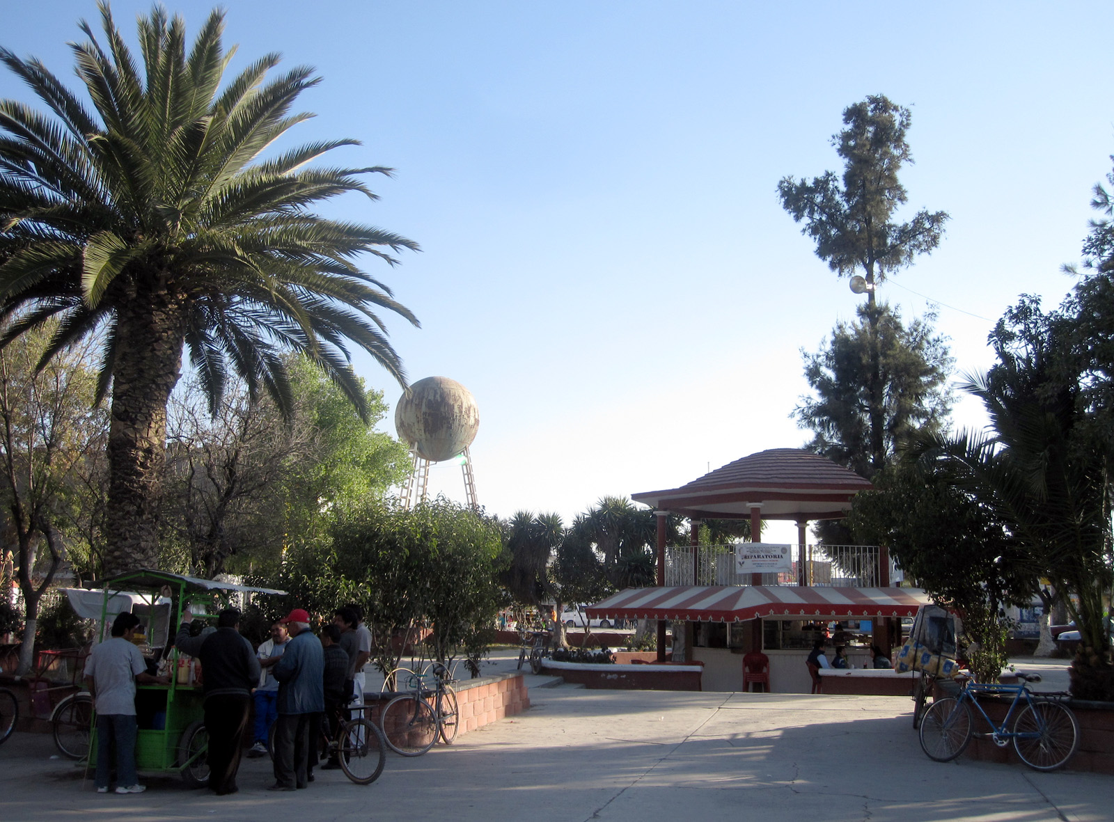 Sentrum av San Salvador de Atenco i Atenco kommune i Mexico